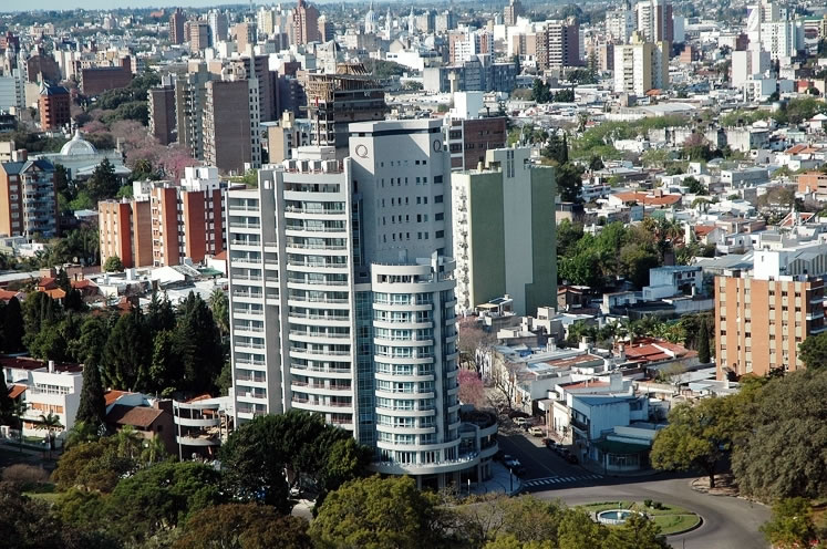 Paraná vista desde el Rosedal